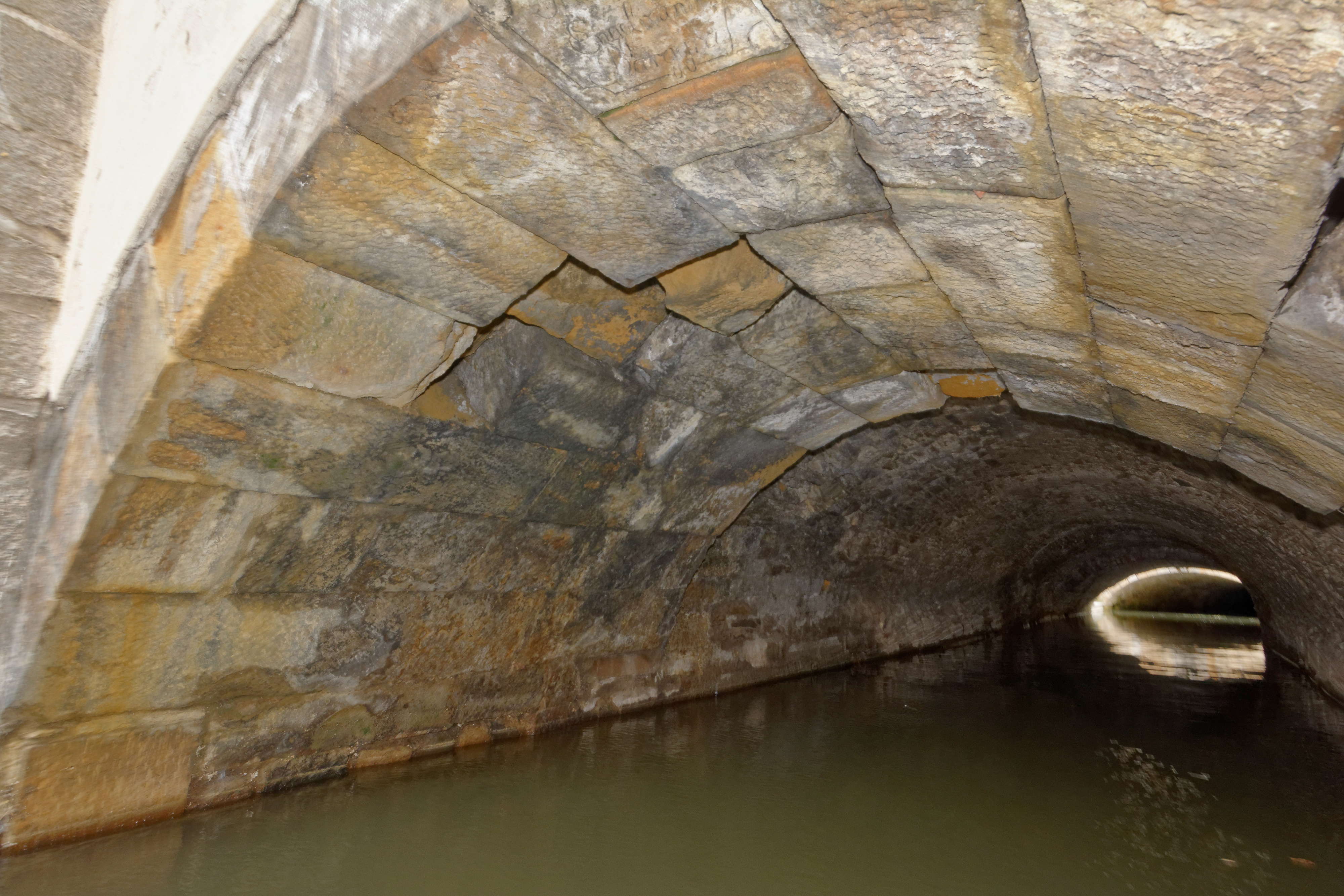 Litovel. Nečíz pod radniční věží.